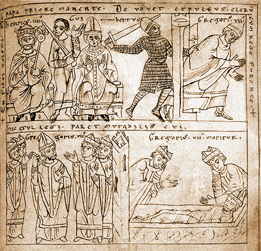 Abbildung aus der Weltchronik des Otto von Freising, "Geschichte der zwei Reiche" (lat. "Chronica sive Historia de duabus civitatibus"), 12. Jh.